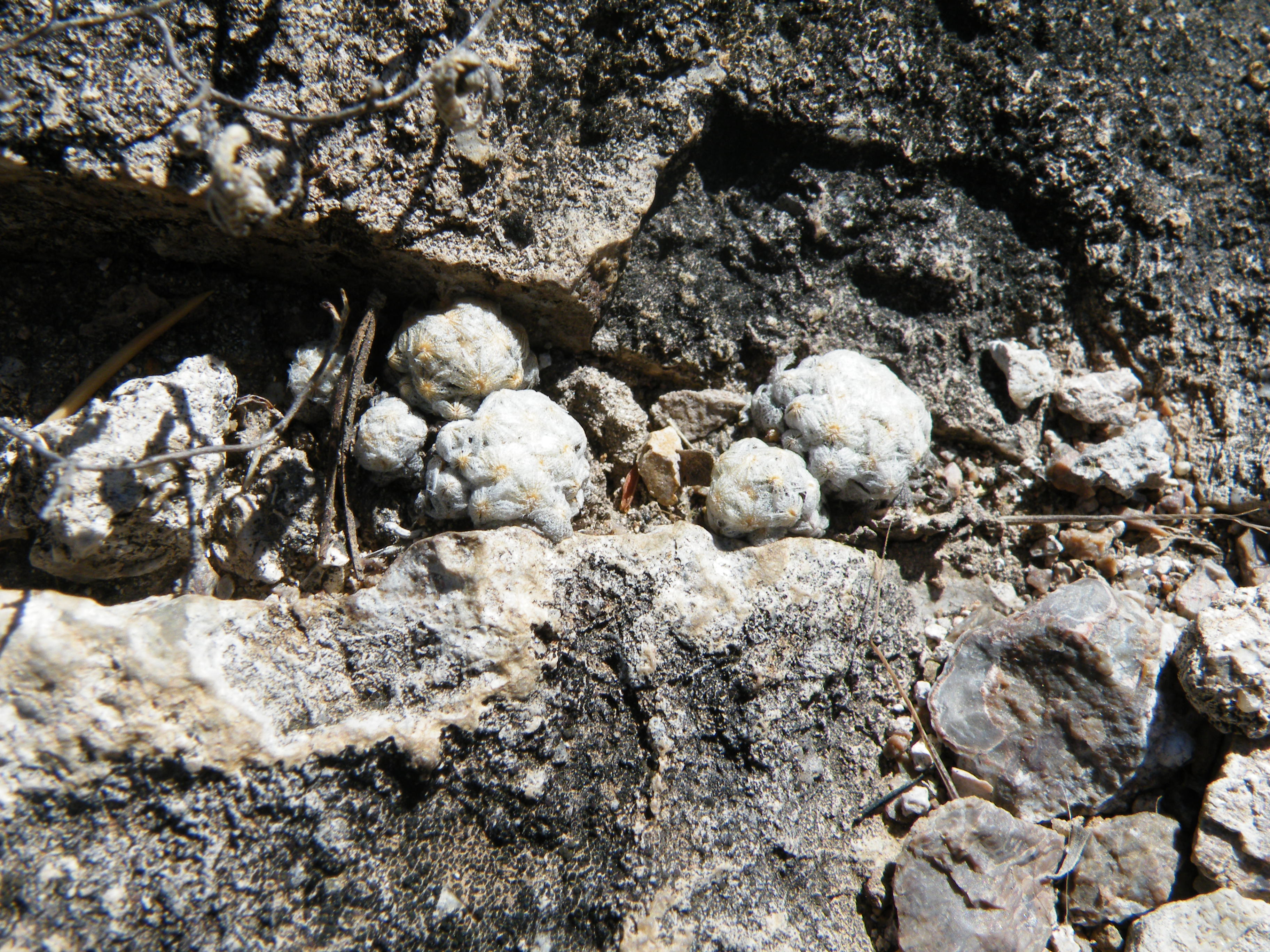 Coneto Pass, Durango